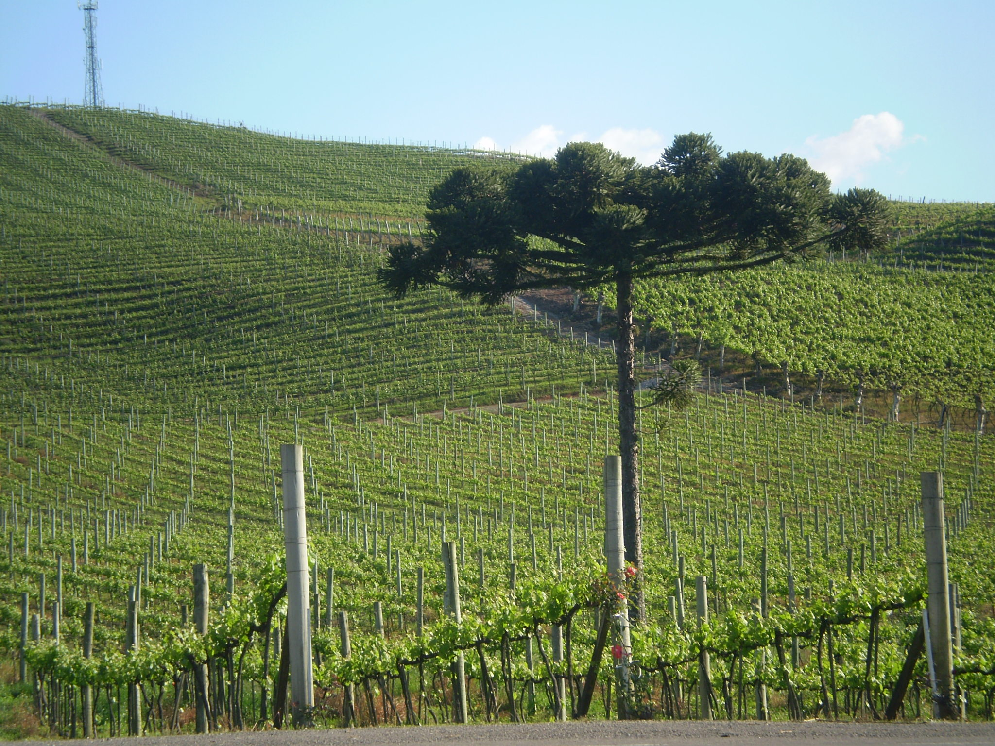 Vinhedos Miolo, Vale dos Vinhedos, RS-444.